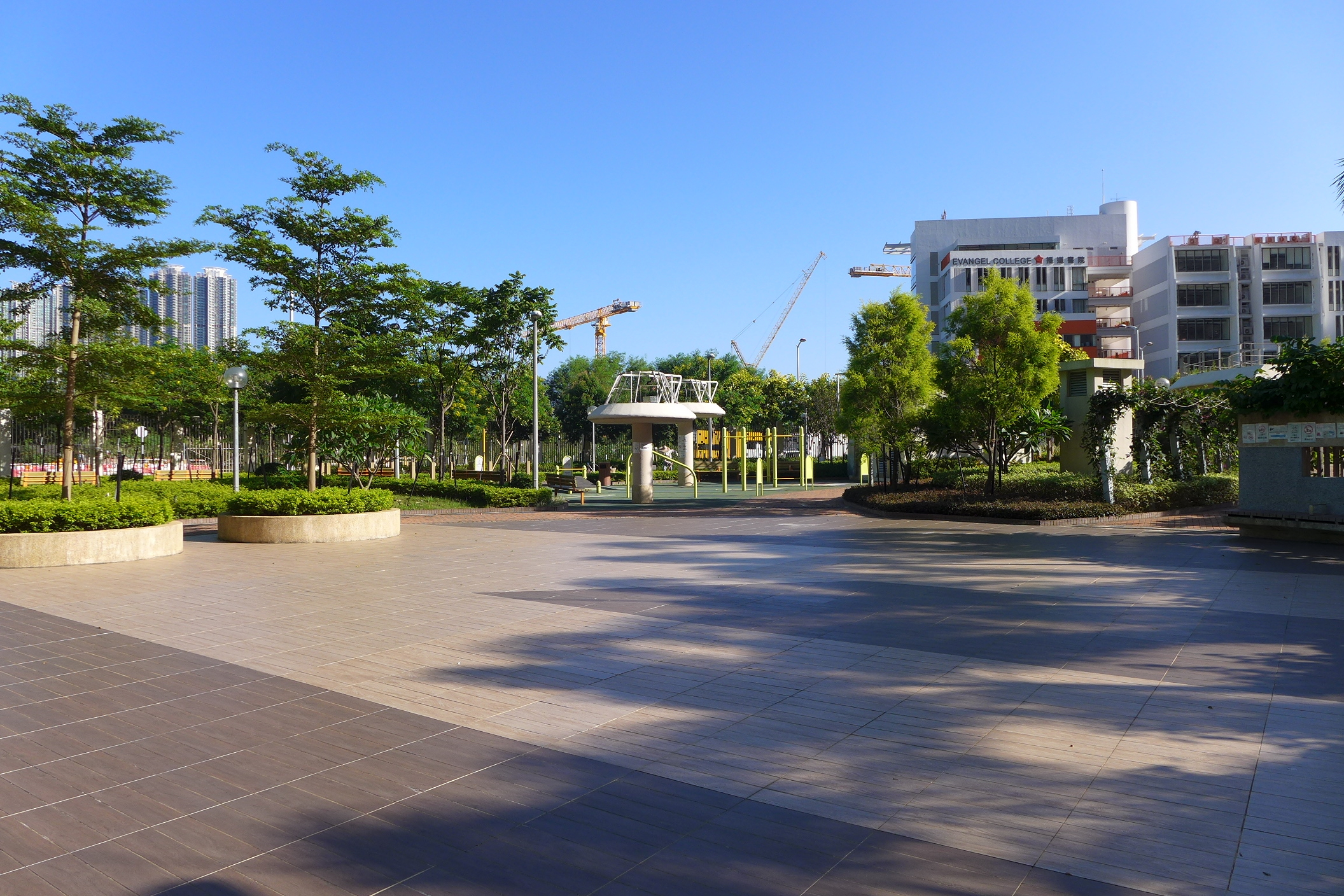 Yee Ming Estate Park